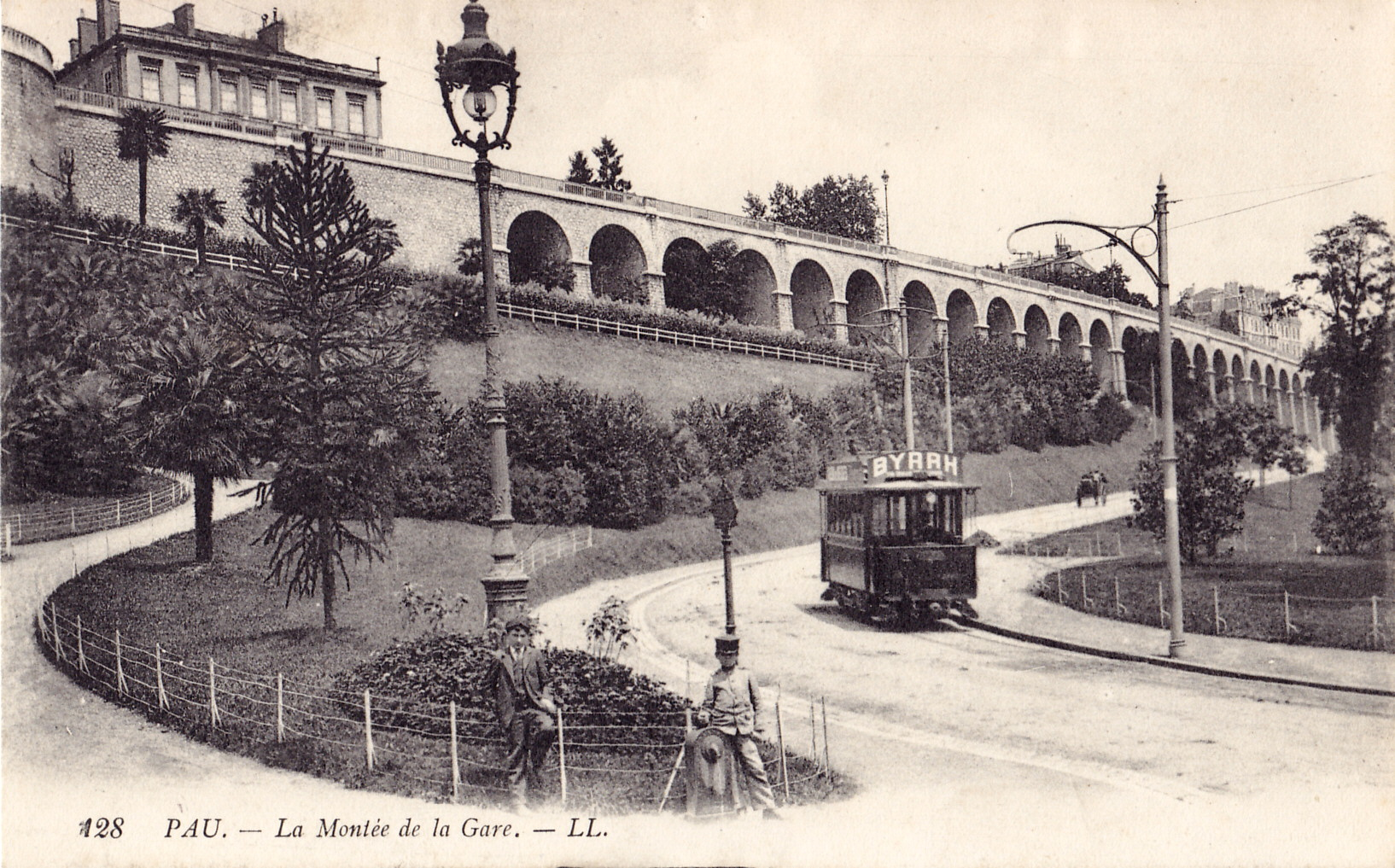 Carte postale ancienne éditée par LL, n°128 : PAU - La Montée de la Gare